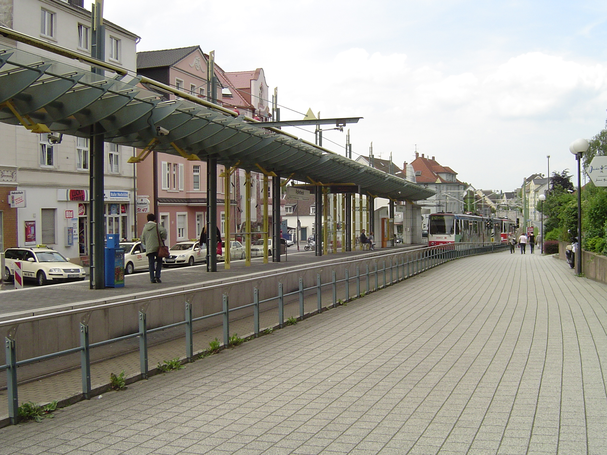 Endhaltestelle der U47 in Dortmund-Aplerbeck